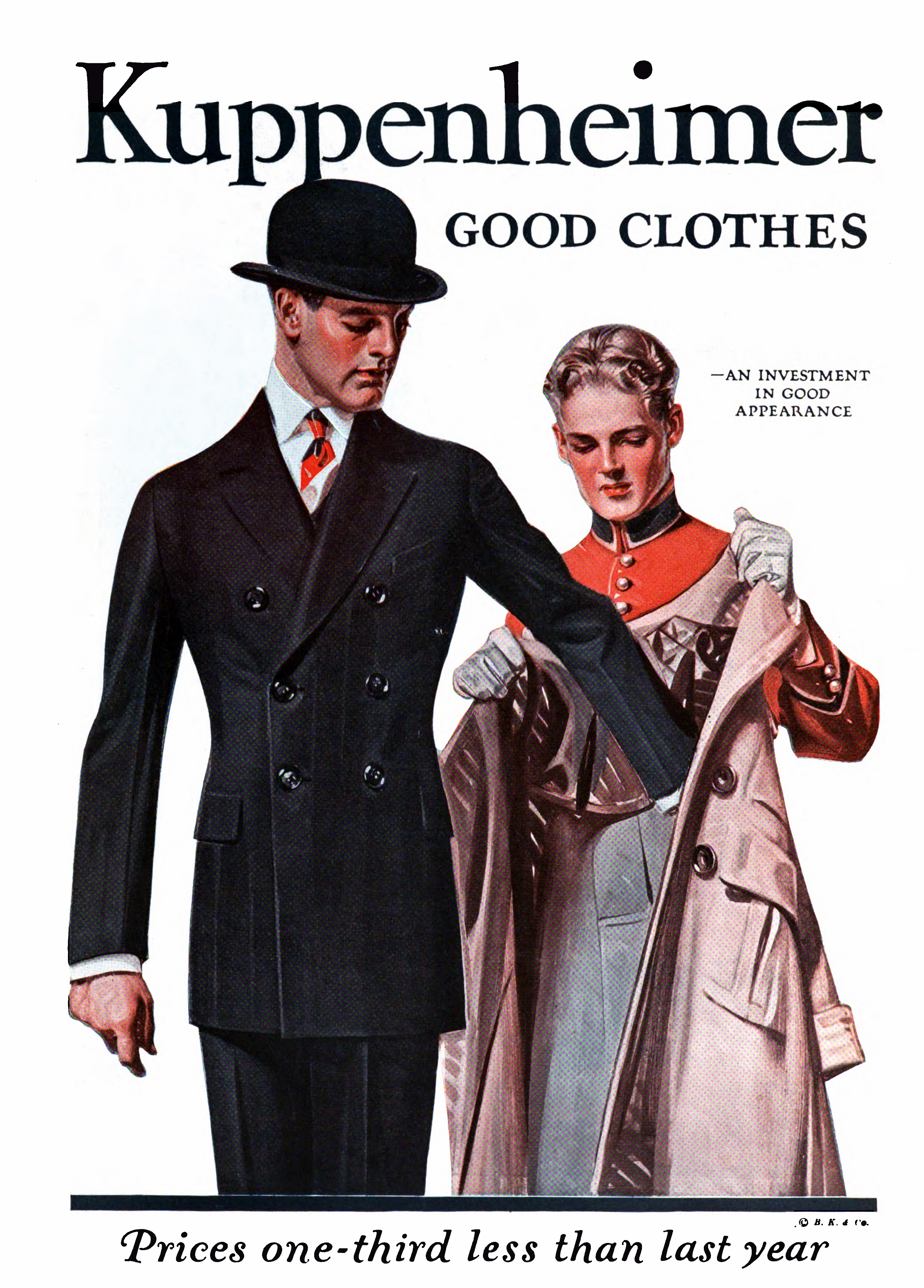 Kuppenheimer advetisement